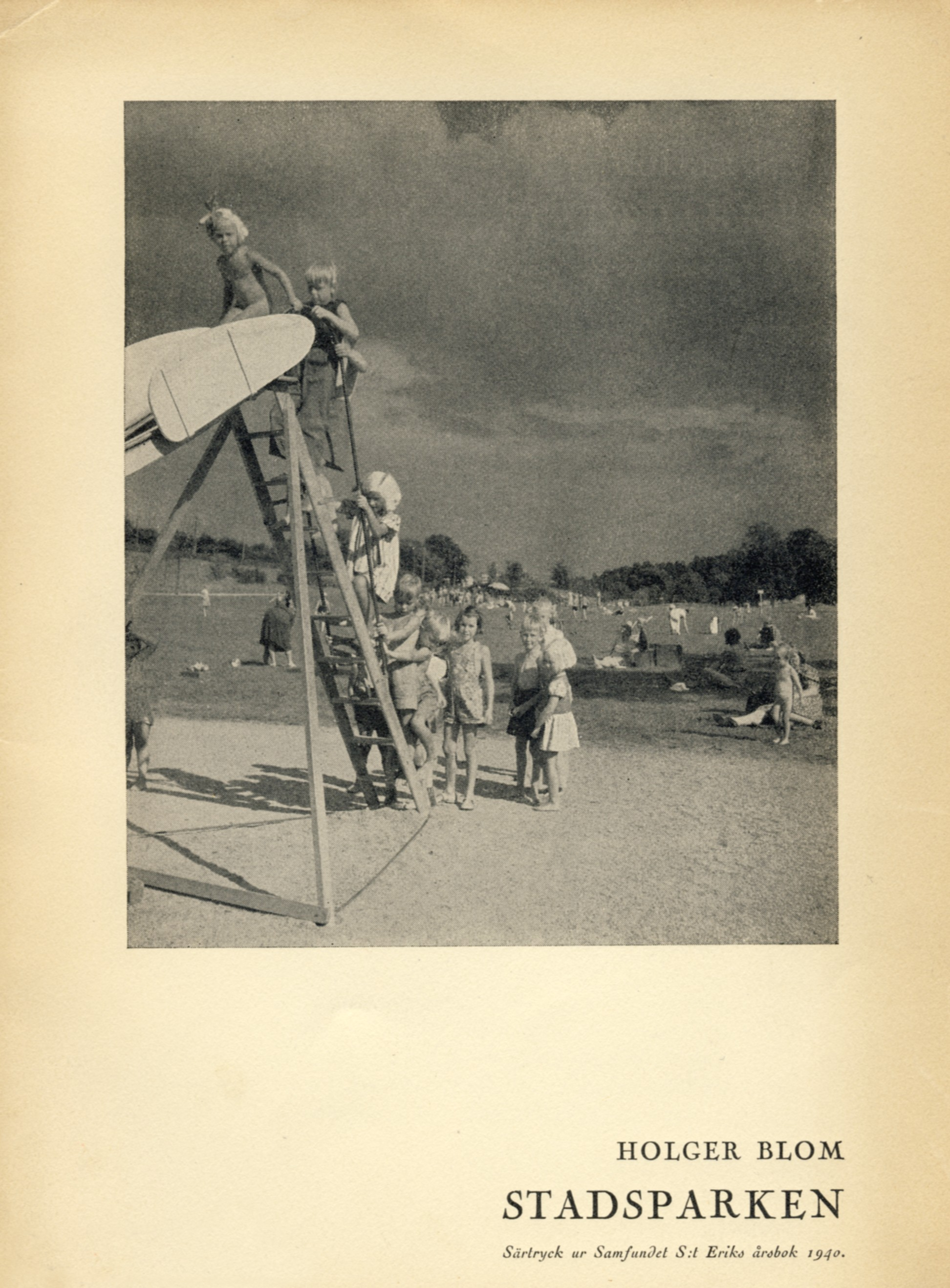 Holger Blom "Stadsparken" särtryck au Samfundet S:t Eriks årsbok 1940